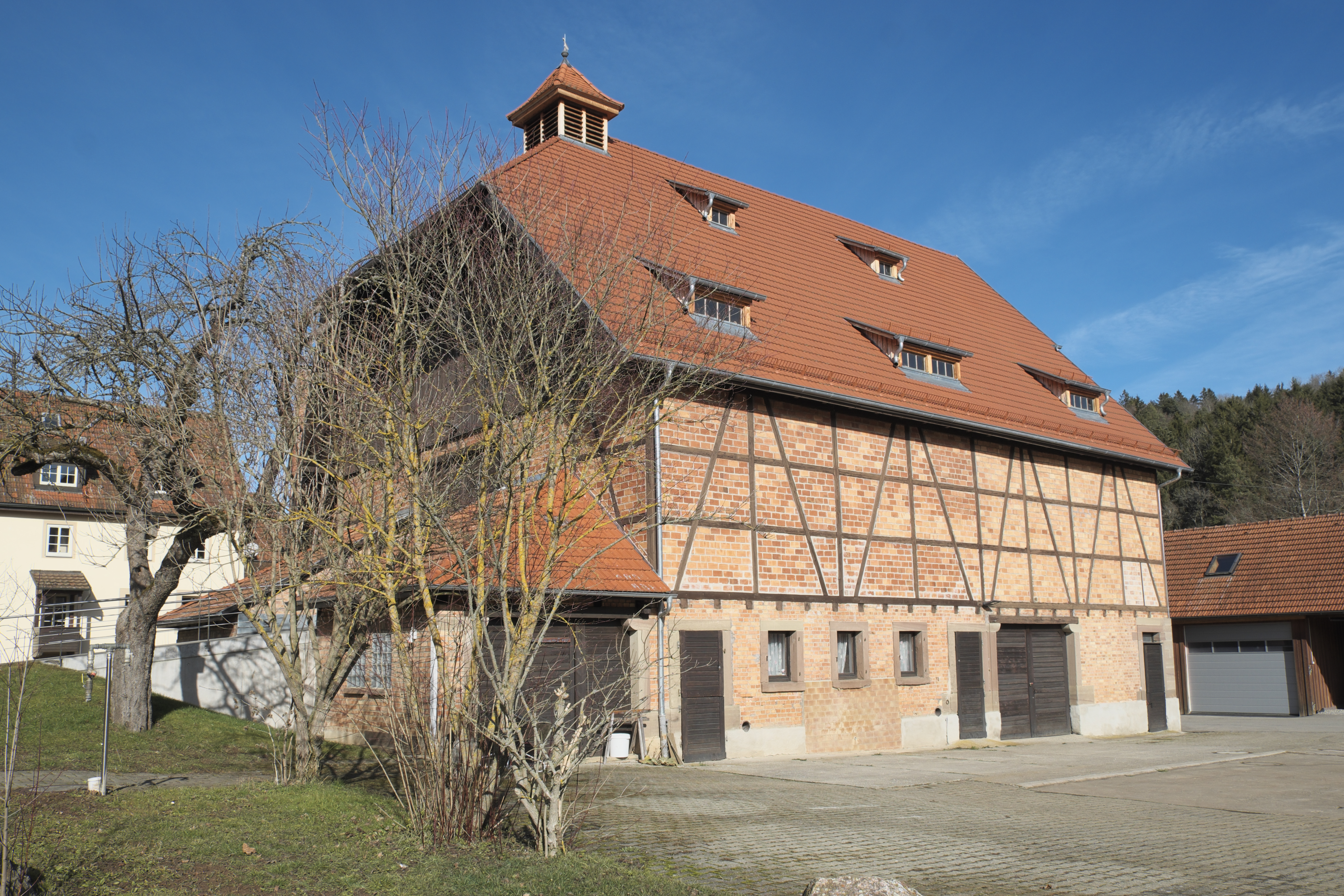 Fischermühle bei Rosenfeld im Zollernalbkreis (Baden-Württemberg/Deutschland), Mühle